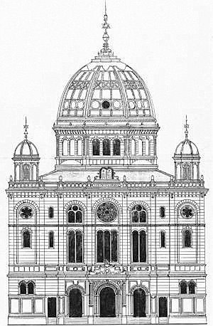 Synagoga v Teplice; designed 1875, errected 1880-1882; by architect Hermann Rudolph